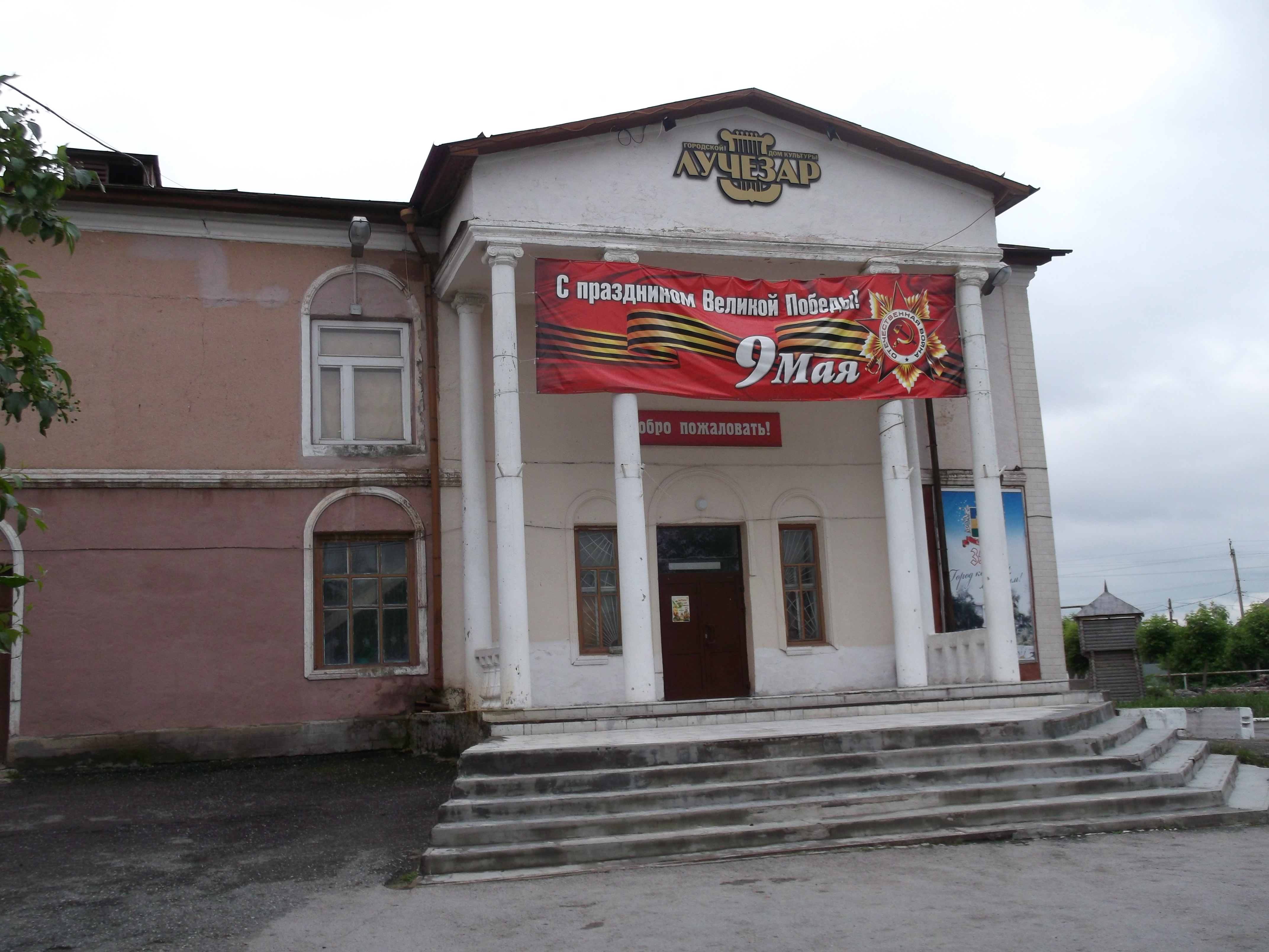 г. Катайск